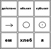 таблица порядка слов ВОС